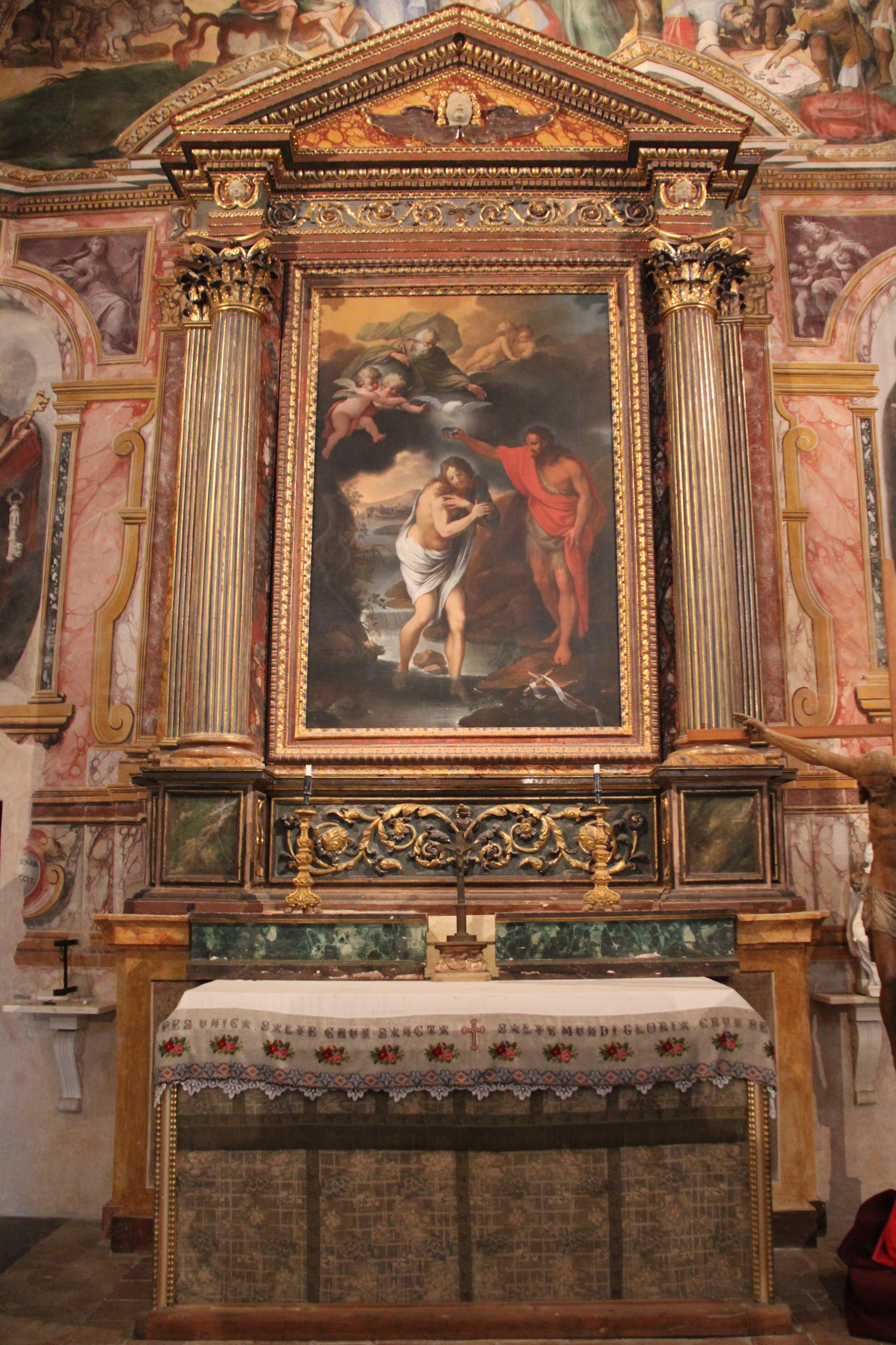 Osimo, Chiesa di San Giovanni Battista o Battistero, altare